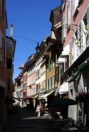 In der Altstadt von Vevey